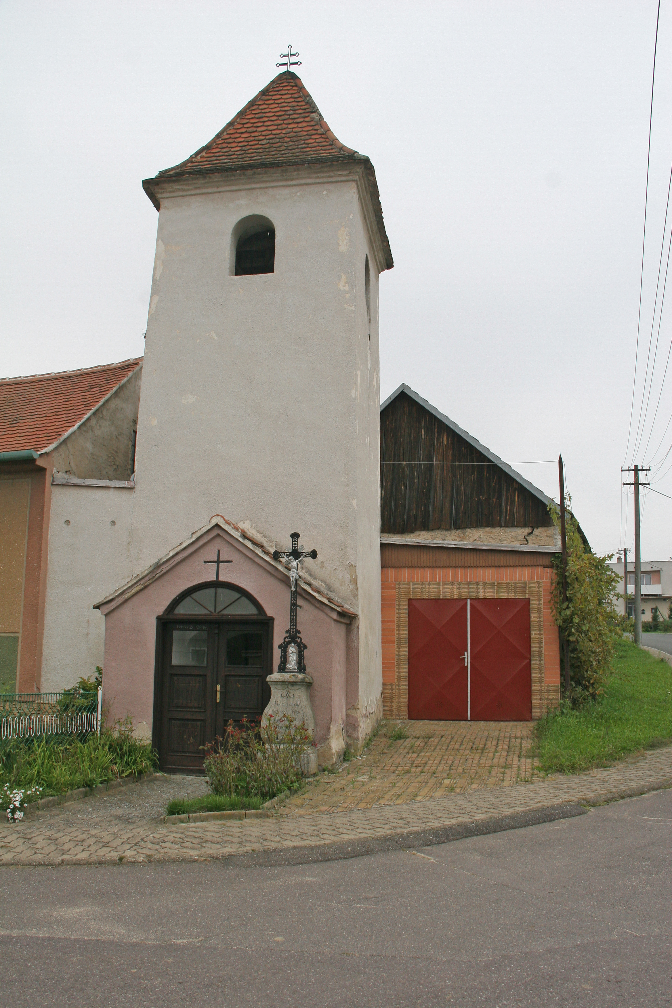 Zvonička, náves, Žerůtky (okres Znojmo).